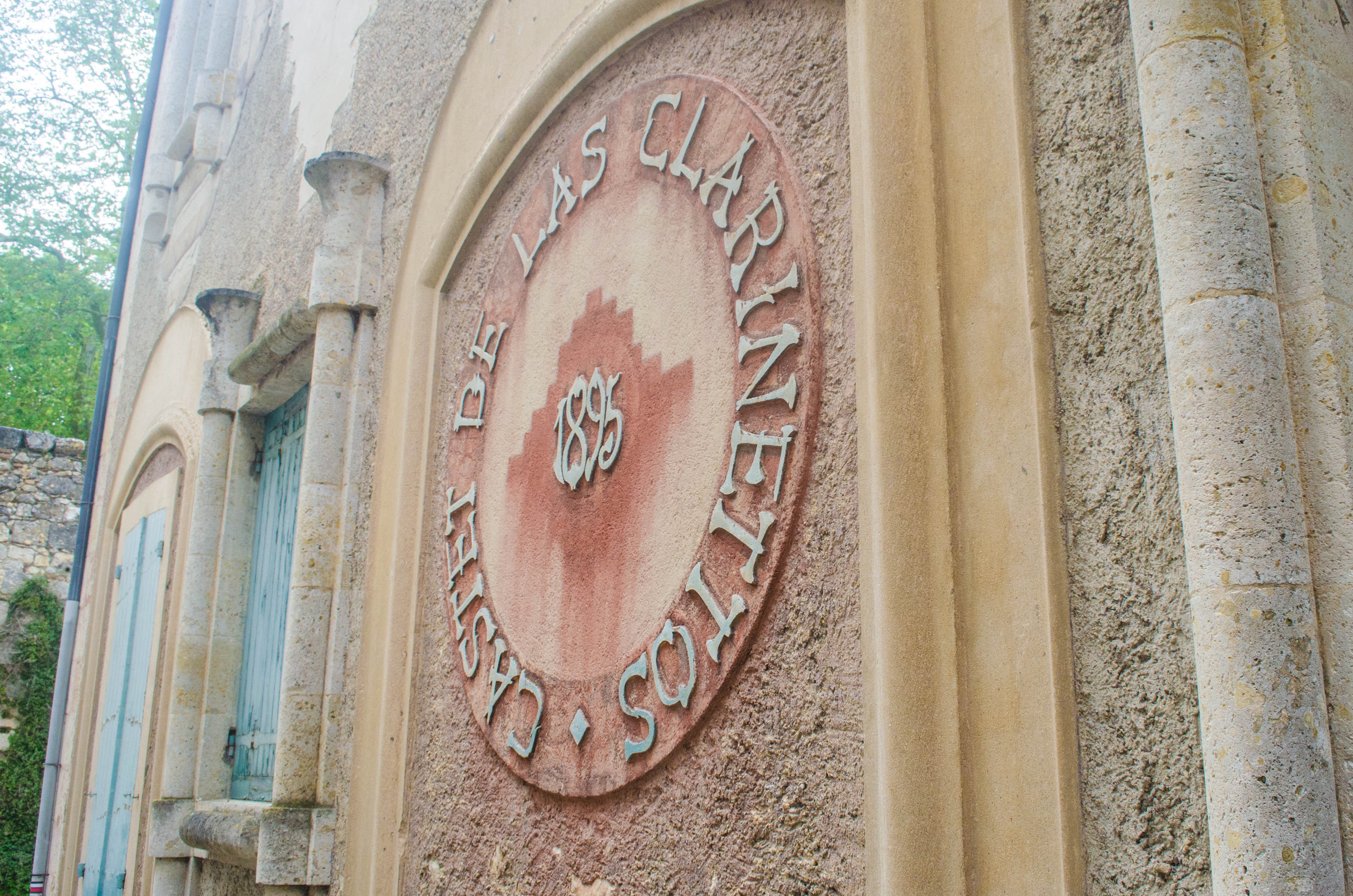 Lectoure, Gers, France. Maison dite Castet de las Clarinetos (château des clarinettes), 1895. Selon la tradition, le propriétaire de cette maison, située en contrebas de l’hôtel de ville, alors également sous-préfecture, passait ses journées à jouer de la clarinette. Excédé, le sous-préfet lui interdit de toucher à son instrument. Le propriétaire fit alors rebâtir sa maison en l’ornant de clarinettes, et lui donna ce nom.